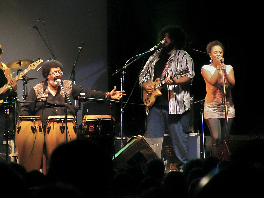 Los músicos Rubén, Matías, y Lucila Rada, en un espectáculo en Santa Fe (Argentina), el sábado 13 de febrero de 2010. Foto Román Mayorá